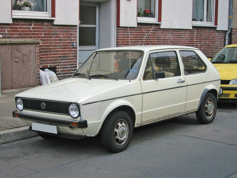 VW Golf 1